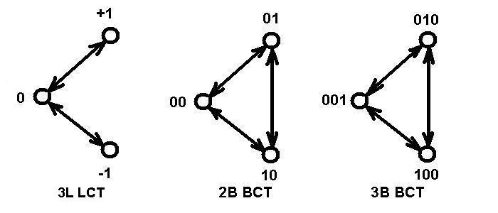 Графы физических троичных систем